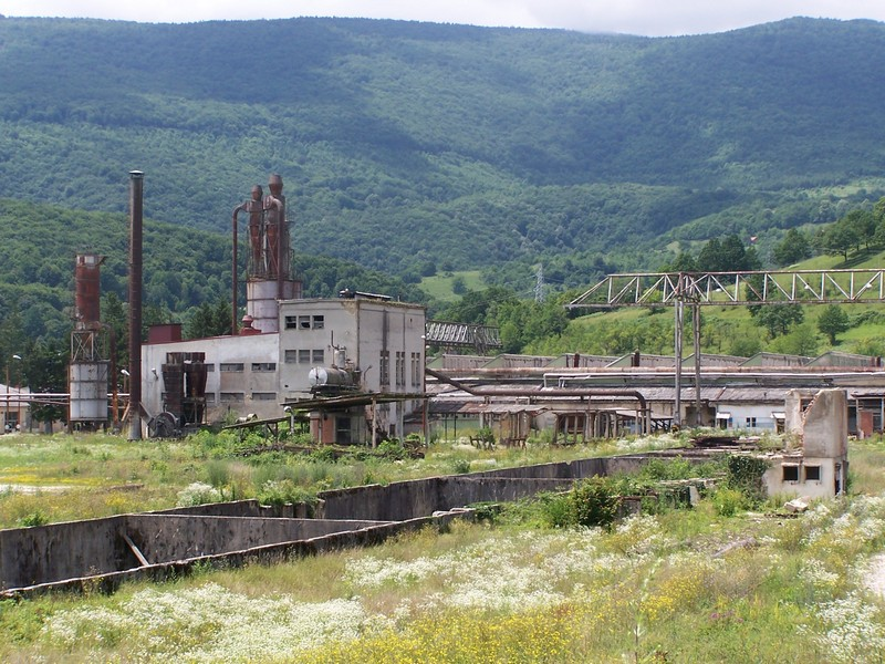 Sanica. Ehemaliges Sägewerk und Holzfabrik.